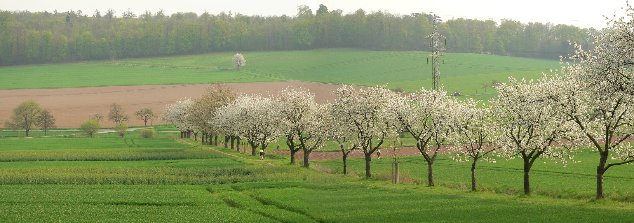 Blick vom Schweineberg auf das Gröninger Feld